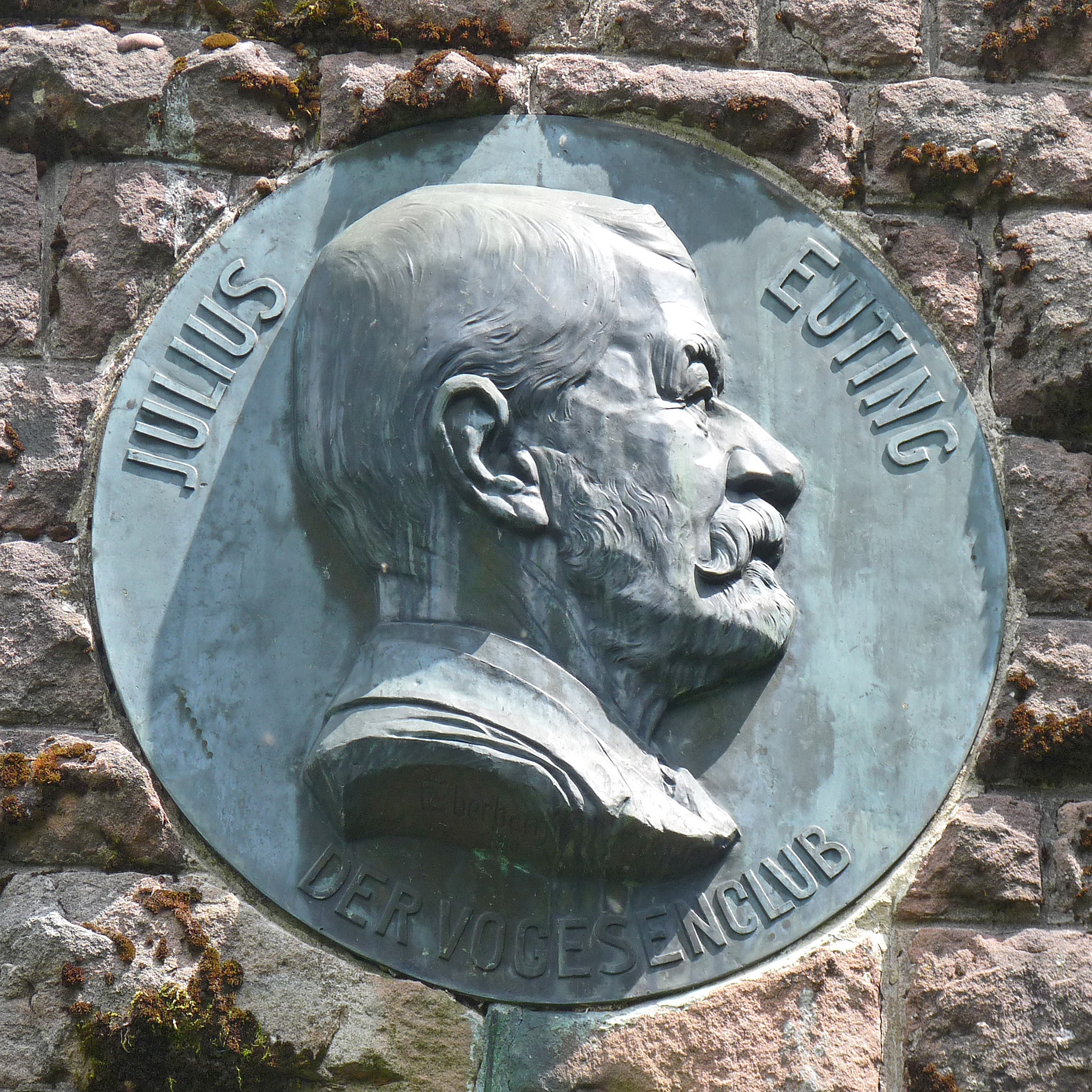 Effigie de Julius Euting sur la tour Julius du Climont (Bas-Rhin)